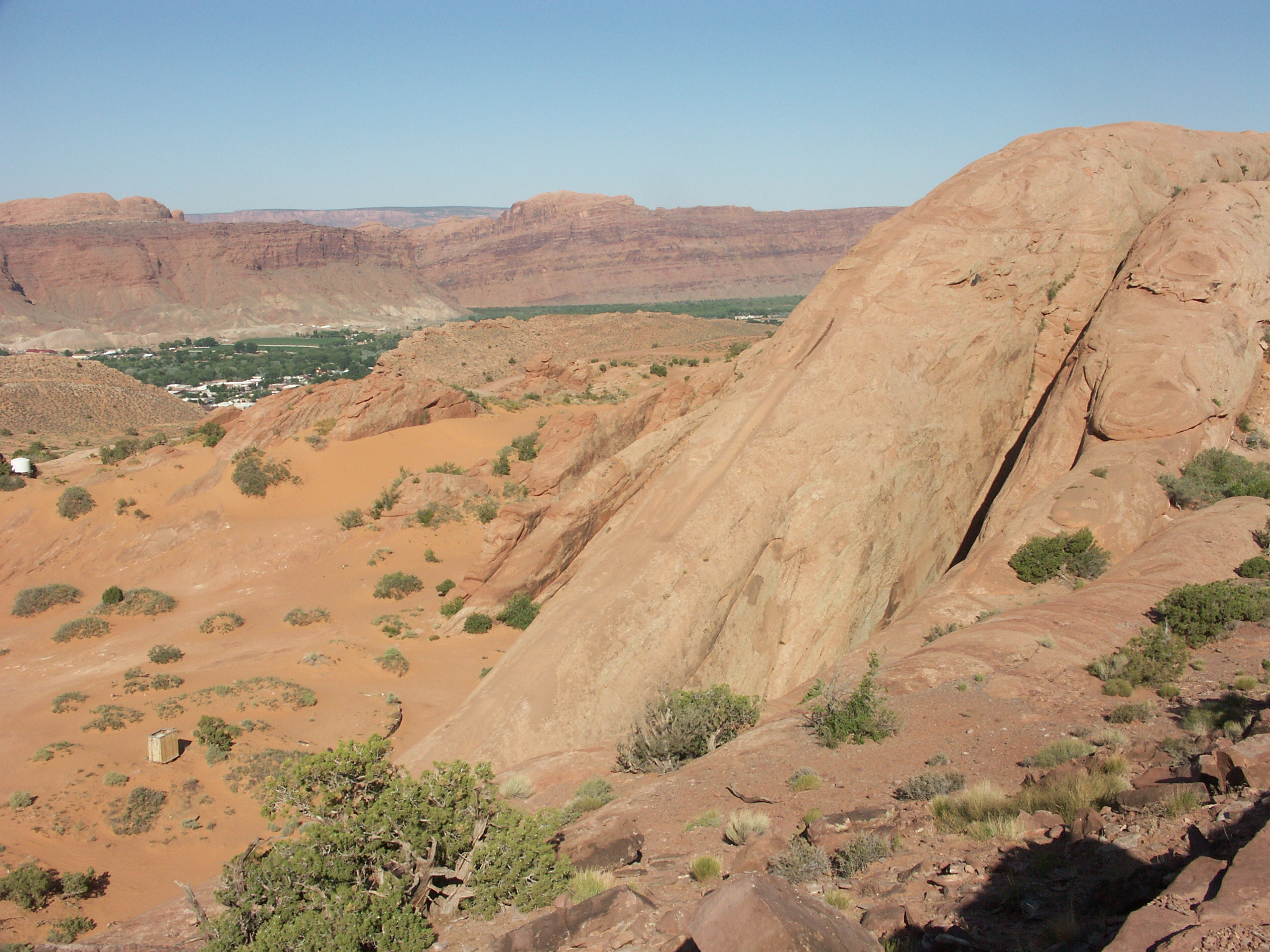 Die legendäre Offroad-Attraktion "Lion's Back" in Moab, Utah, USA